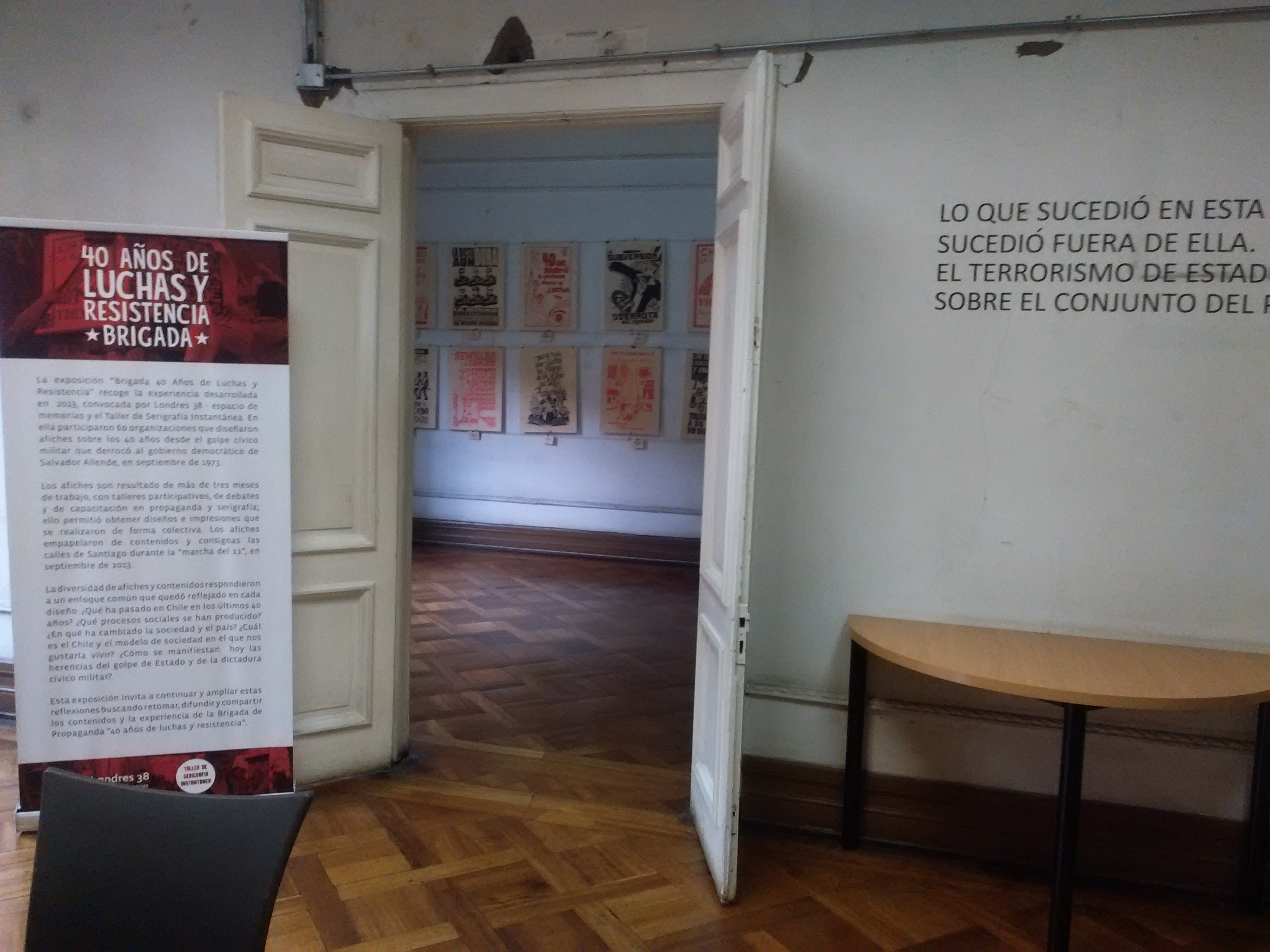 Museo Londres 38 en Santiago, lugar donde las fuerzas represivas del general Pinochet durante la dictadura